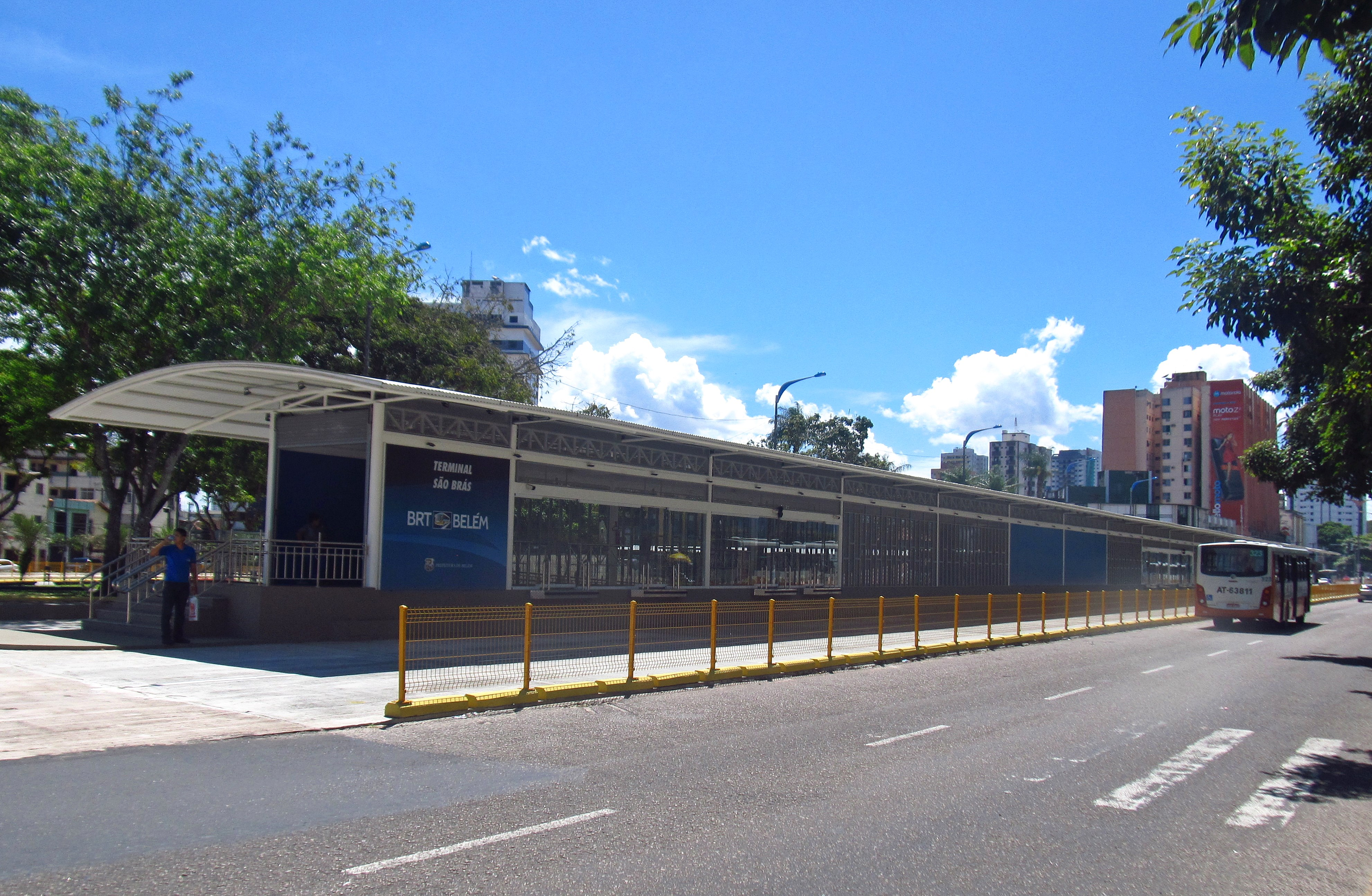 Estação São Brás - Módulo I